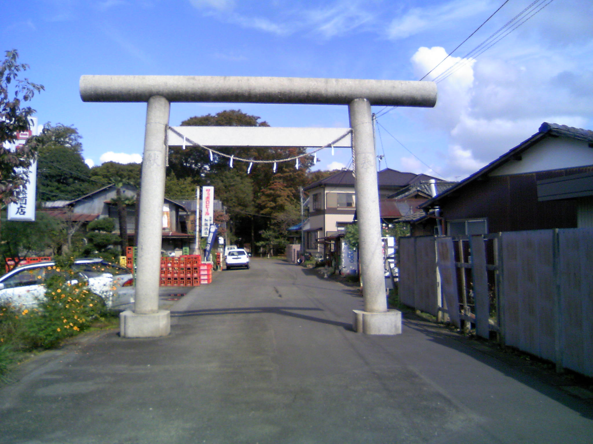 氷川天満神社の南側の一の鳥居。天神道の道しるべにしたがって来るとここにたどり着く。